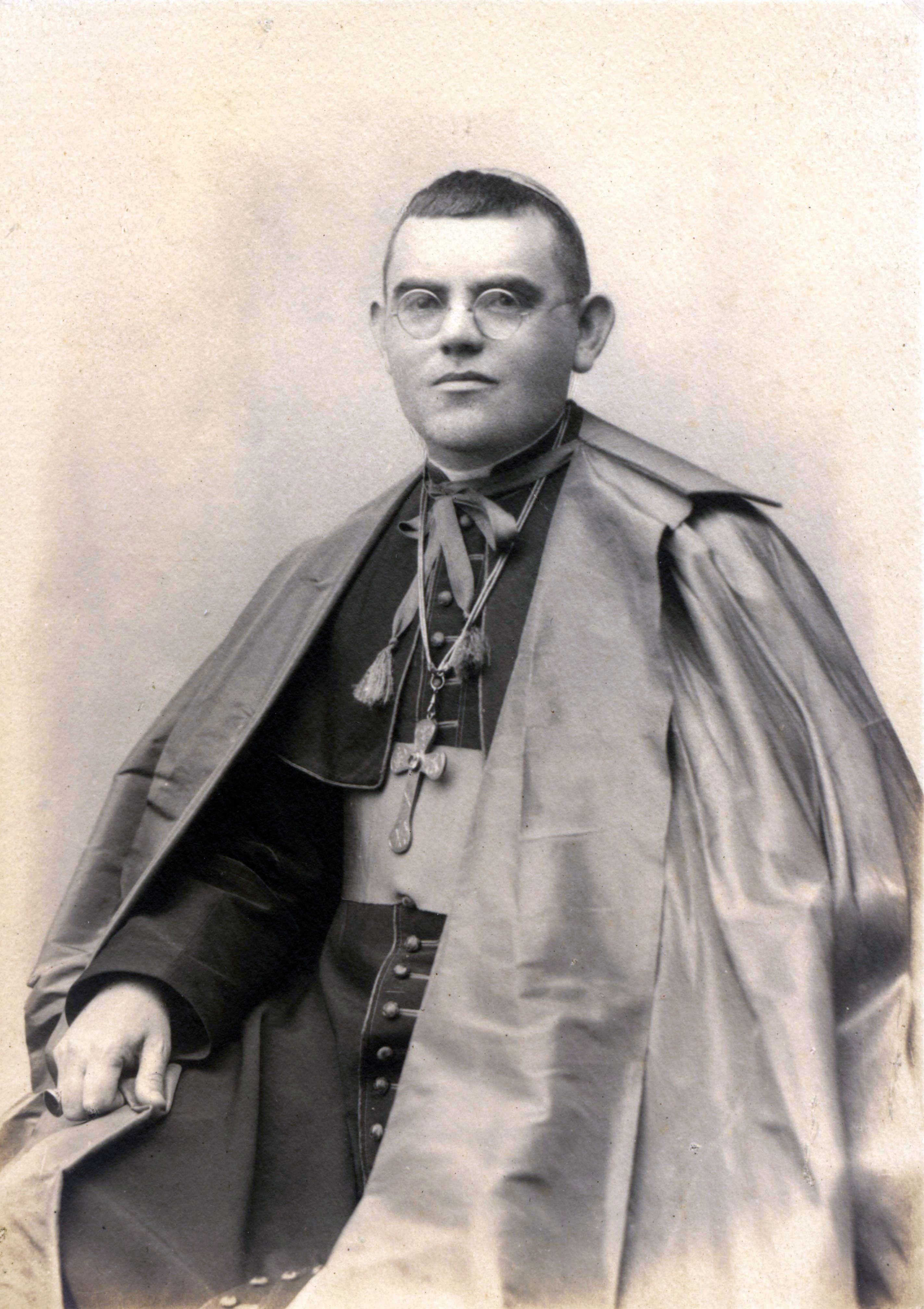 Fotografia de José Carlos de Aguirre com Capa Magna